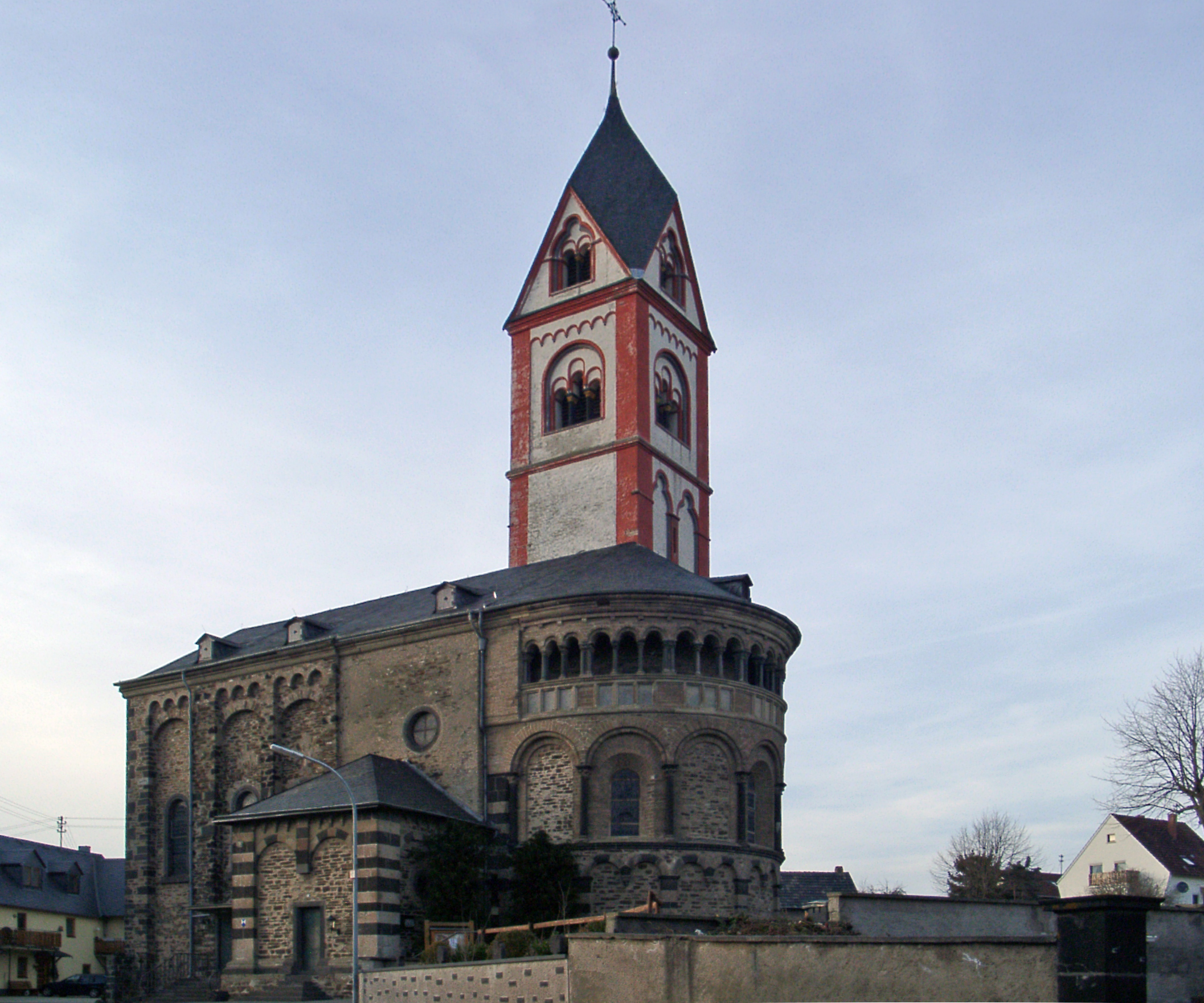 Lonnig auf dem Maifeld, Pfarrkirche St. Jakobus d.Ä.- selbst fotografiert (Klaus Graf) 20.3.2005 - Lizenz: CC-BY